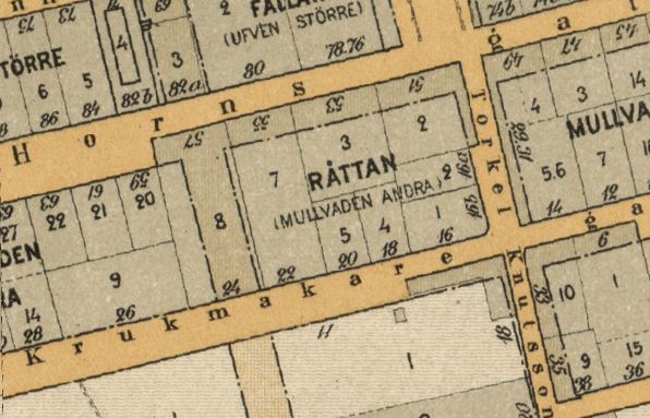 Del av Generalstabens Litografiska Anstalt 1899.